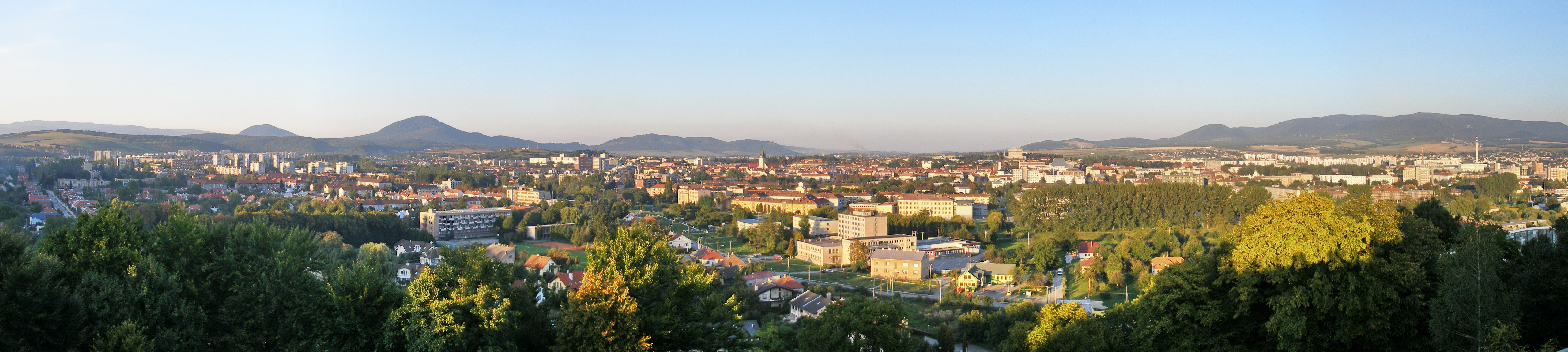 Mesto Prešov, panoramatický pohľad z Kalvárie